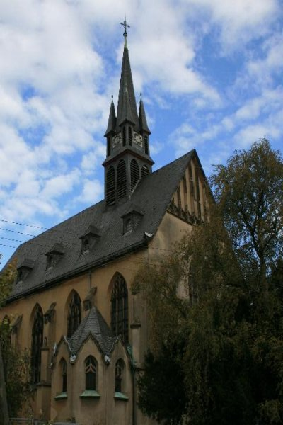 Denkmal Nr. 117 in Schwalmtal-Hostert